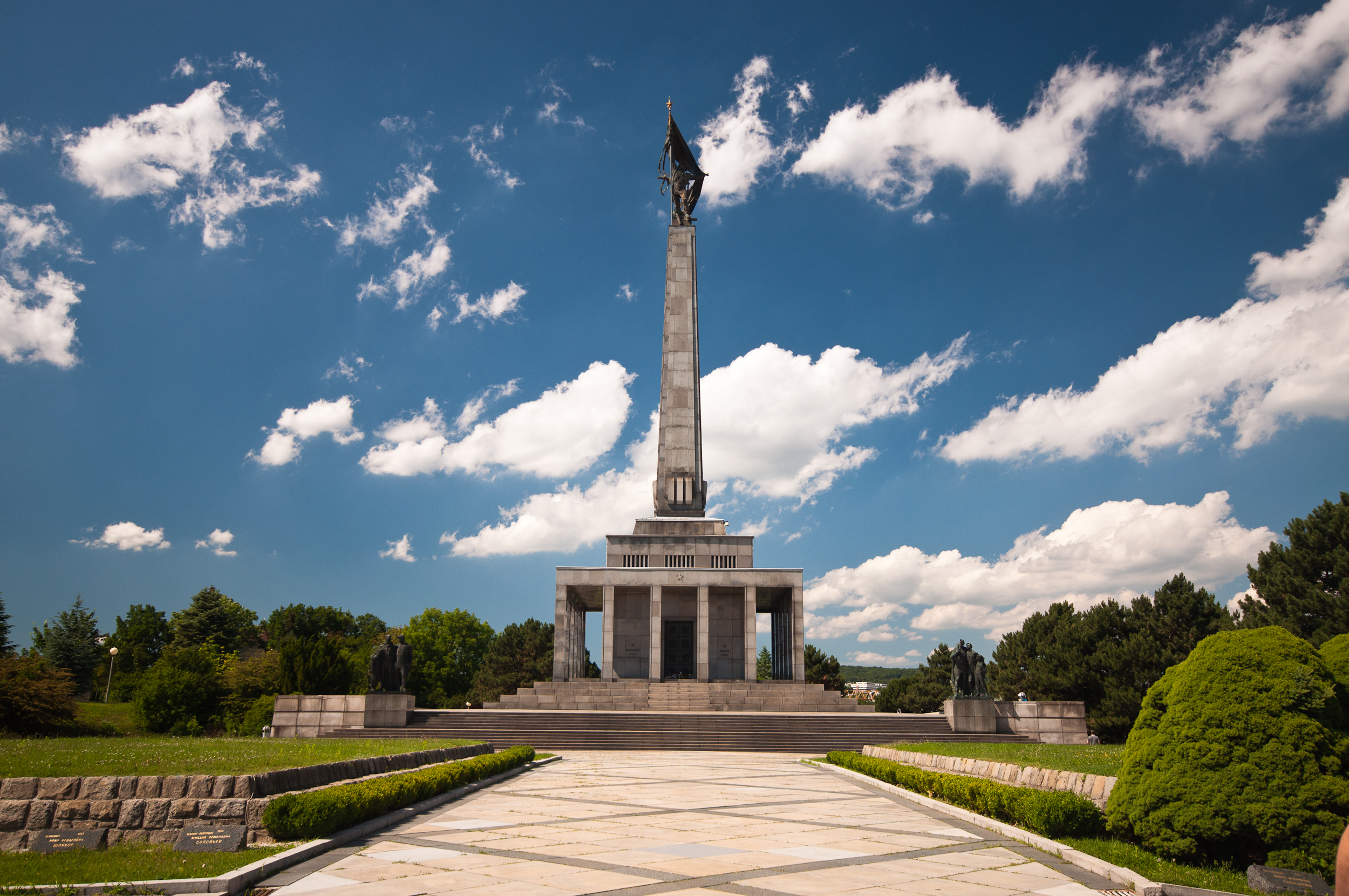 Pamätník s terasou